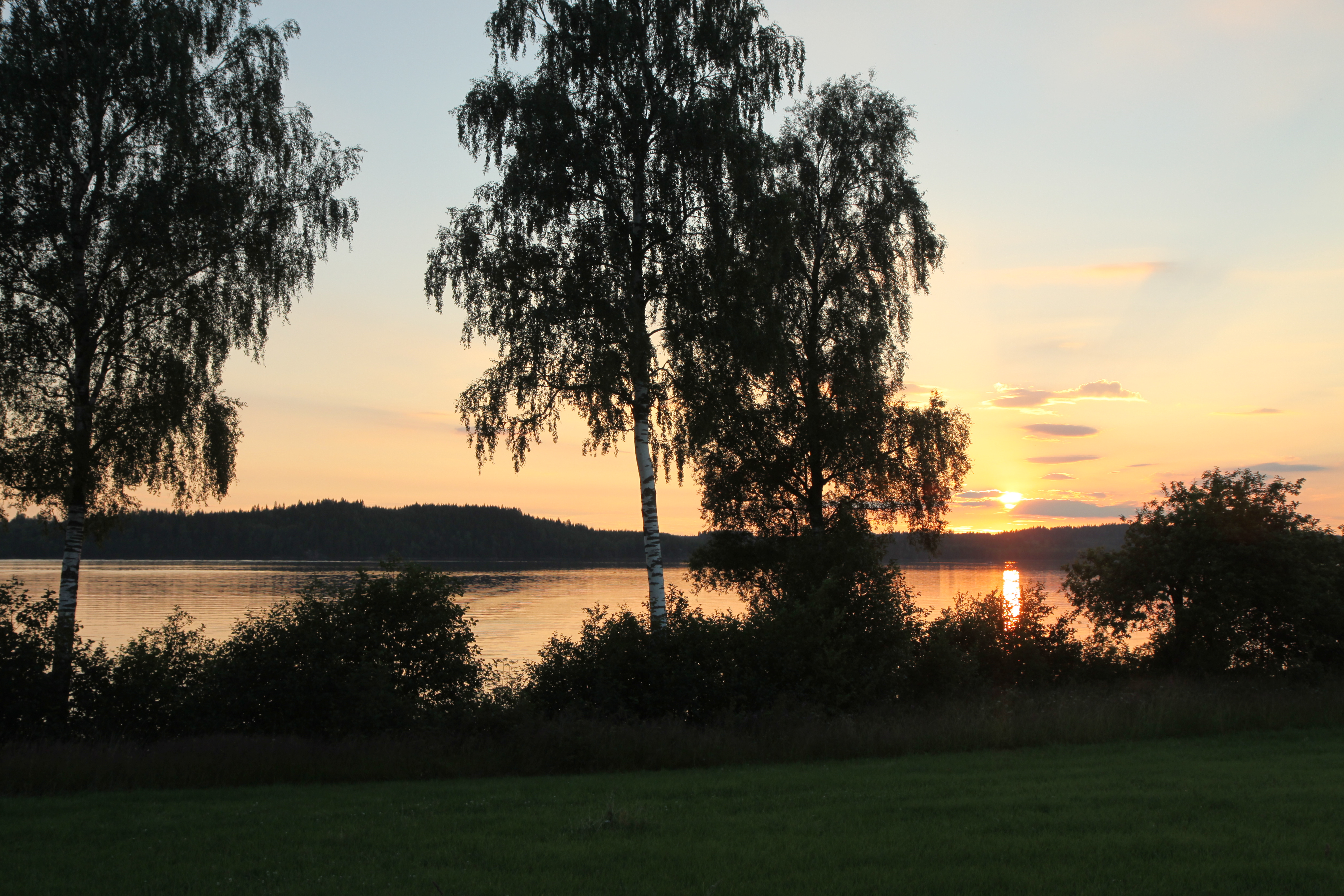 Solnedgång över sjön Holsjön.